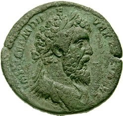 Portret van Didius Julianus op een sestertie. Foto met toestemming van Classical Numismatic Group, Inc. (CNG) Munt van CNG coins. Toestemming voor gebruik.